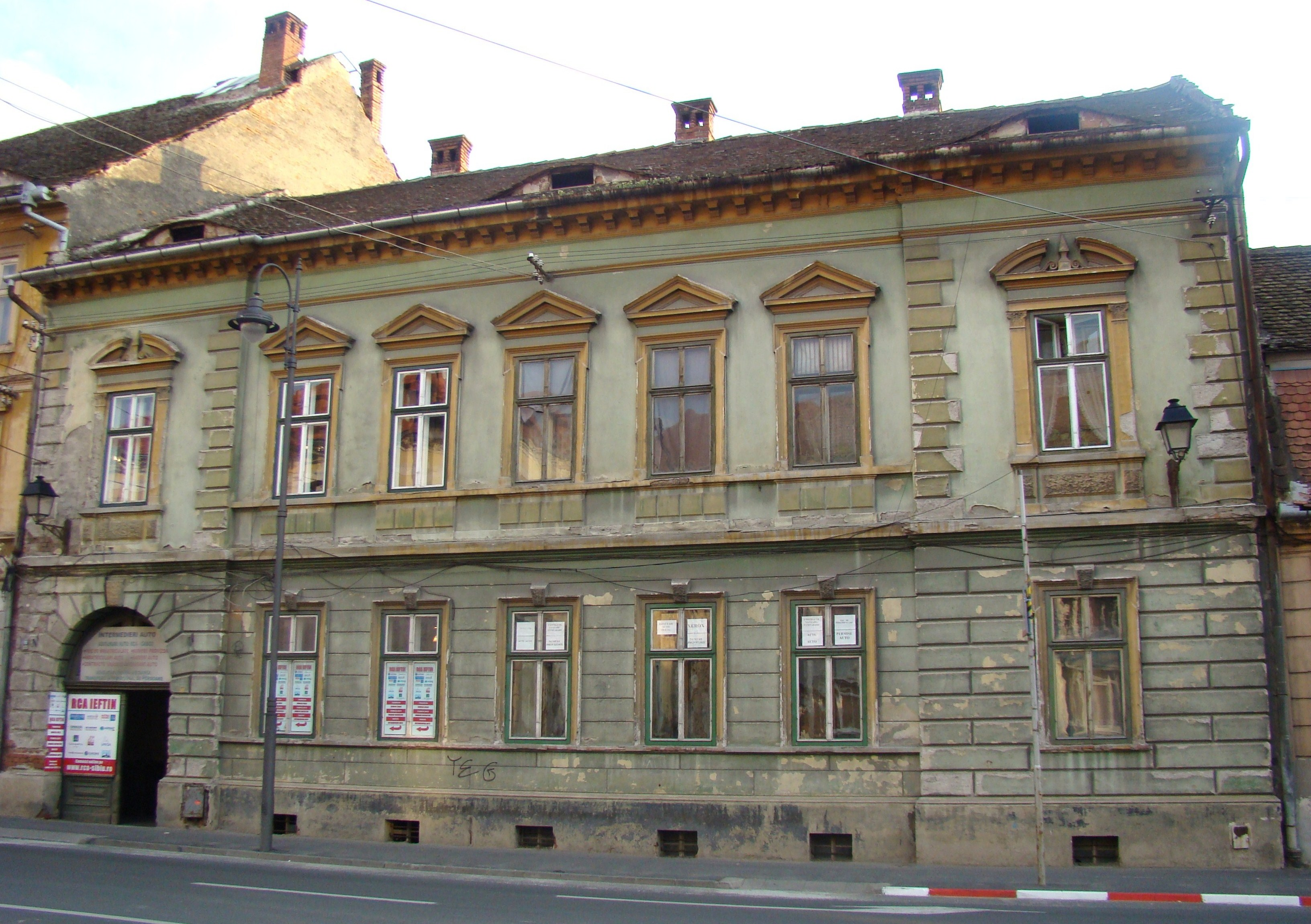 Clădire monument istoric, str.Andrei Șaguna, nr.19